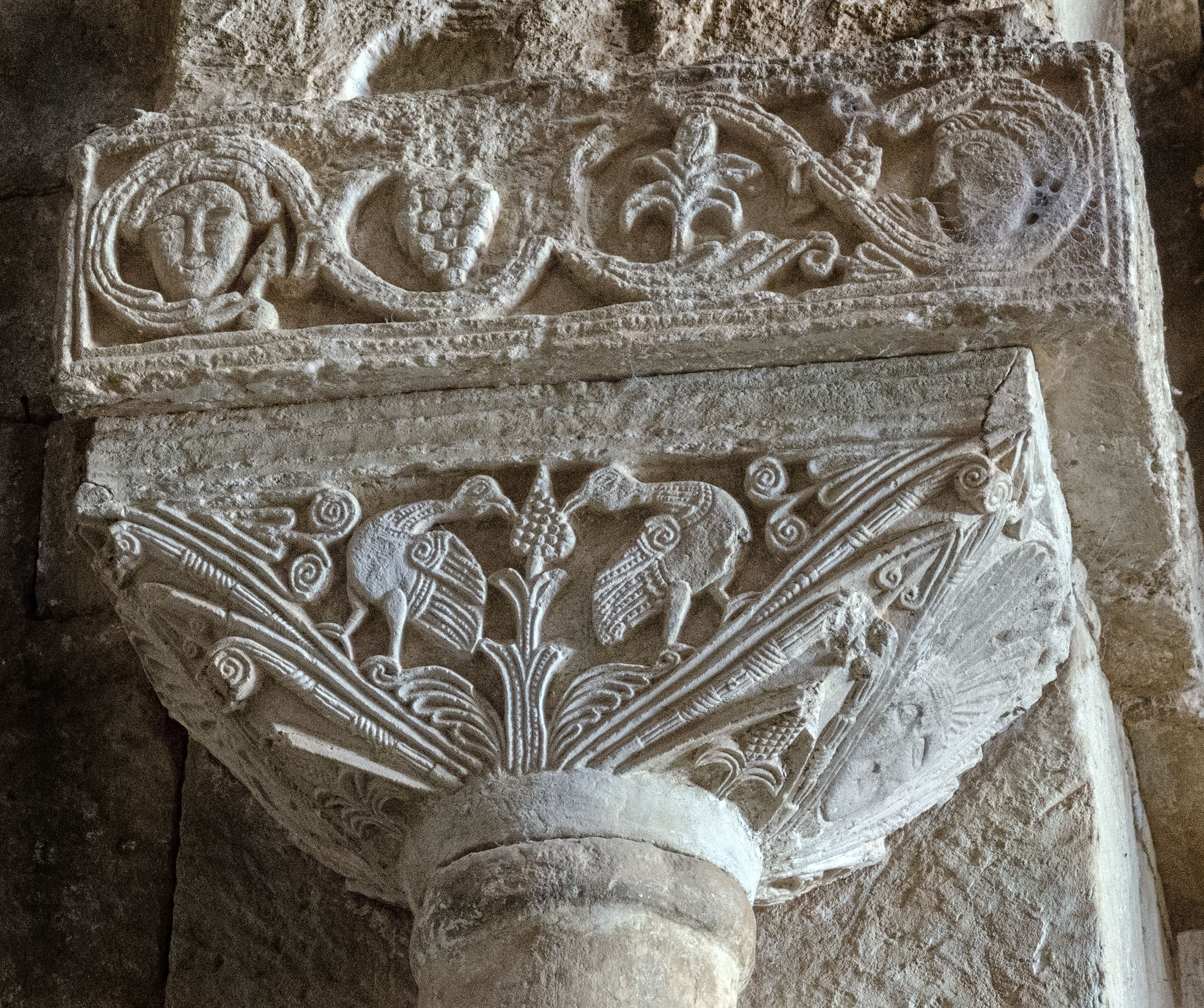 Es una de las escasas iglesias visigodas que quedan en España. Se construyó a finales del siglo VII, justo antes de la invasión y conquista musulmana. Entre 1930 y 1932 fue trasladada desde su ubicación original, a orillas del río Esla, a la actual ya que el embalse de Ricobayo la hubiera cubierto. Está en la localidad de El Campillo, en la provincia de Zamora